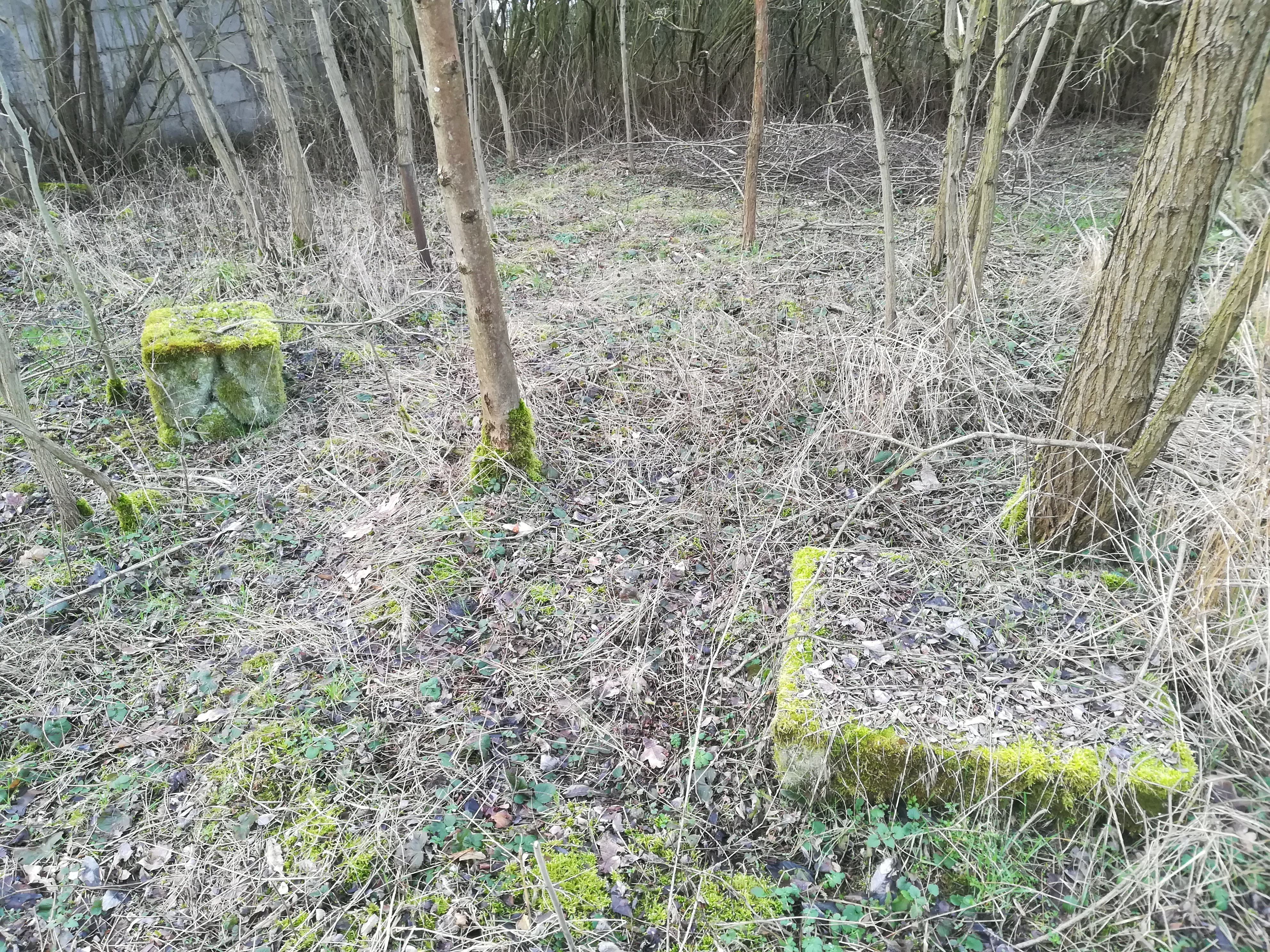 Jerzyn - stary cmentarz ewangelicki.